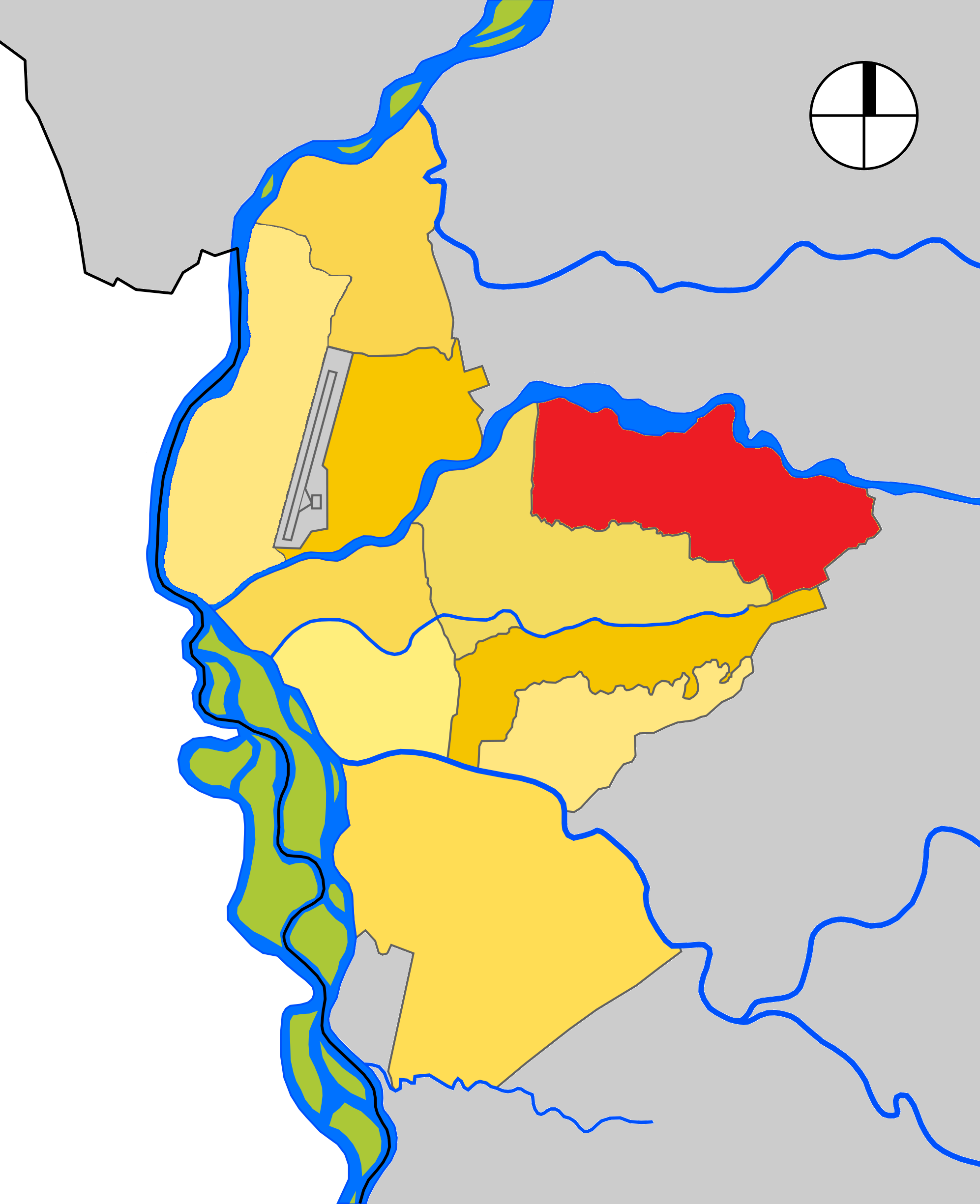 Mapa de las Comuna 10 de Neiva, departamento del Huila, Colombia.